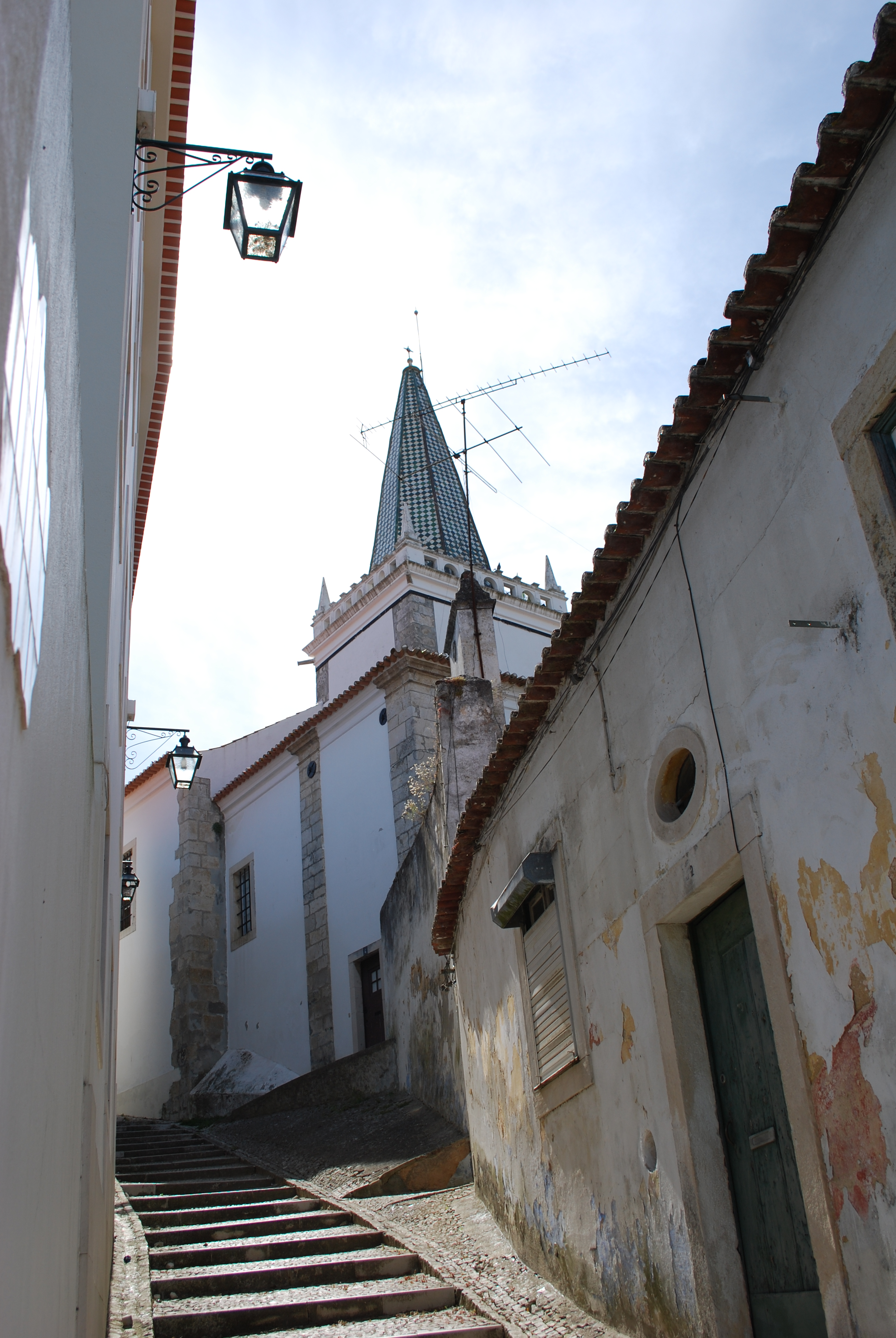 Igreja de Santo Estêvão ou Igreja do Santíssimo Milagre This file was uploaded for Wiki Loves Monuments in Portugal with the unique identifier 70433.